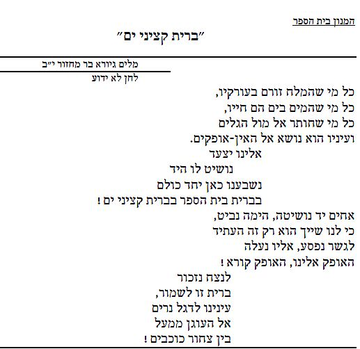 המנון הקדטים שנכתב על ידי גיורא בר ממחזור י"ב1967